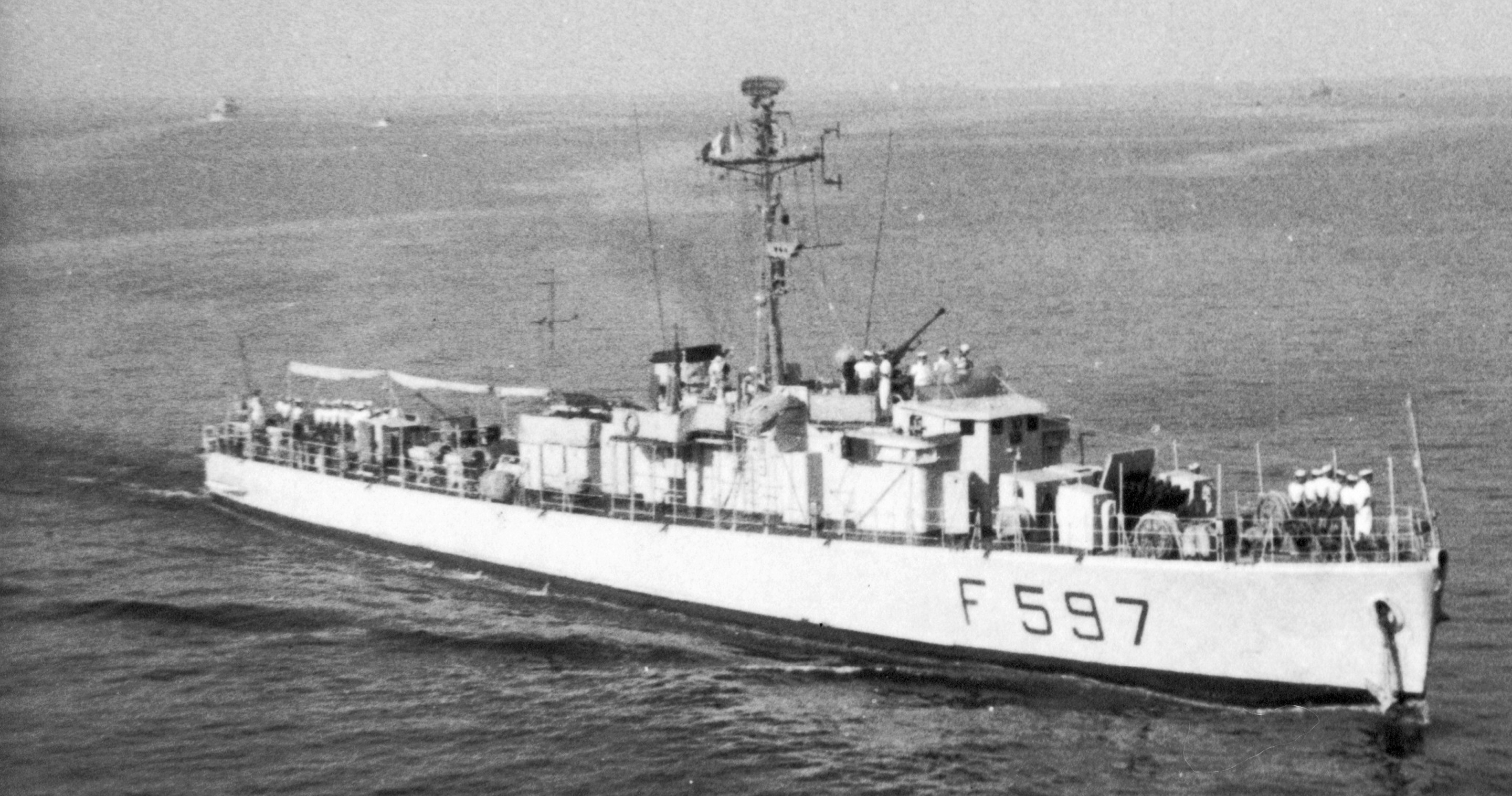 Corvetta “Vedetta” F 597 fotografata a Taranto il 30 agosto 1966